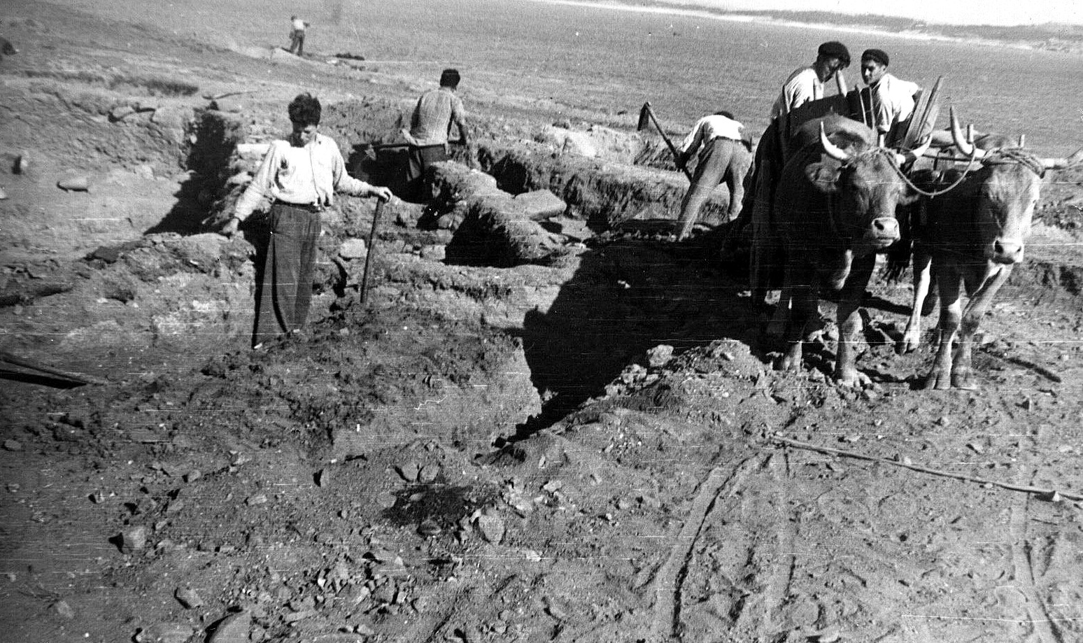 Castro da Lanzada escavacións. 1950. Galicia.